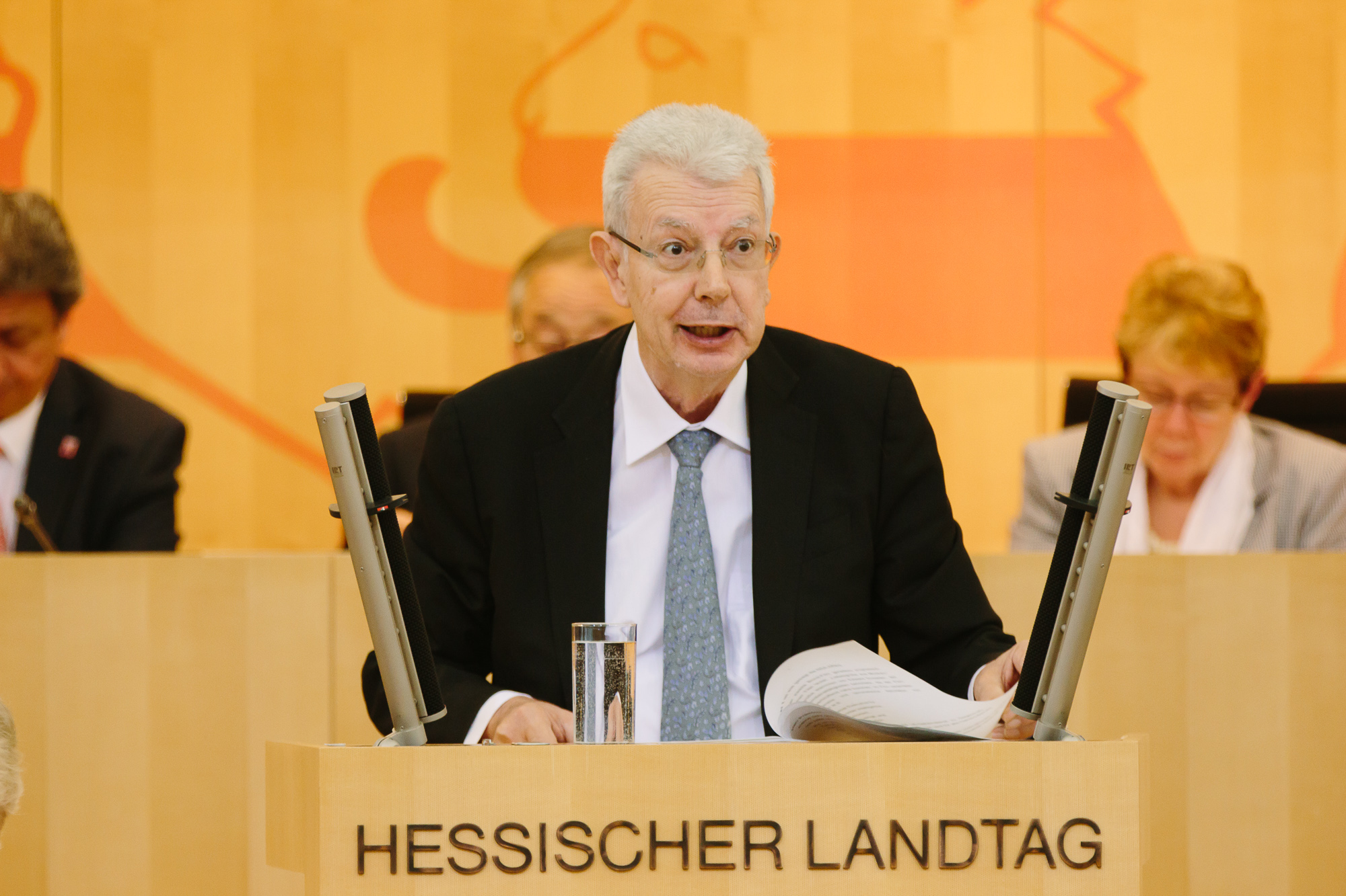 Prof. Dr. Michael Ronellenfitsch vor dem Hessischen Landtag am 05.03.2015